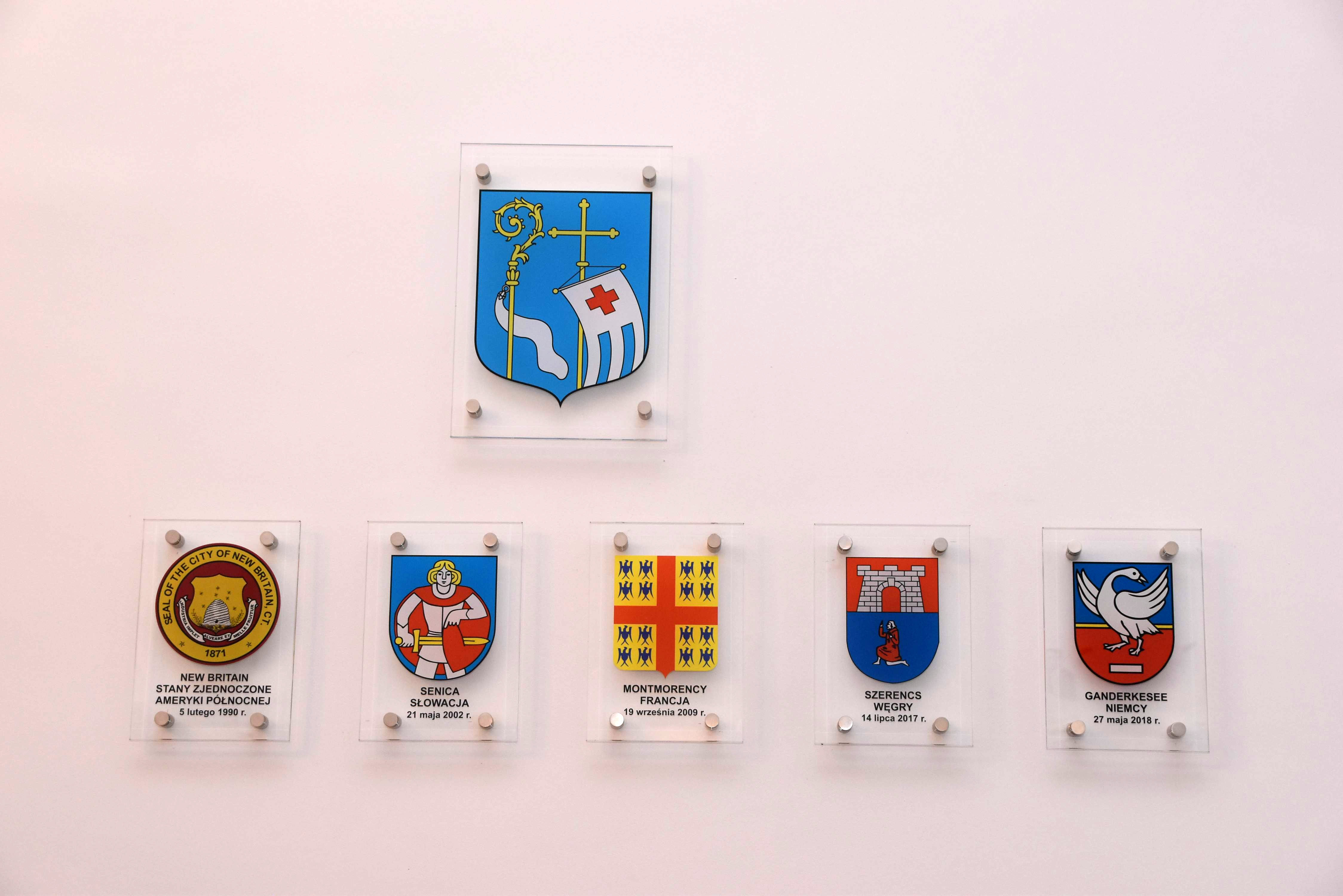 Das Foto zeigt die Embleme der fünf Partnerstädte von Pułtusk, aufgenommen im September 2018 im Ratssaal der Stadt.